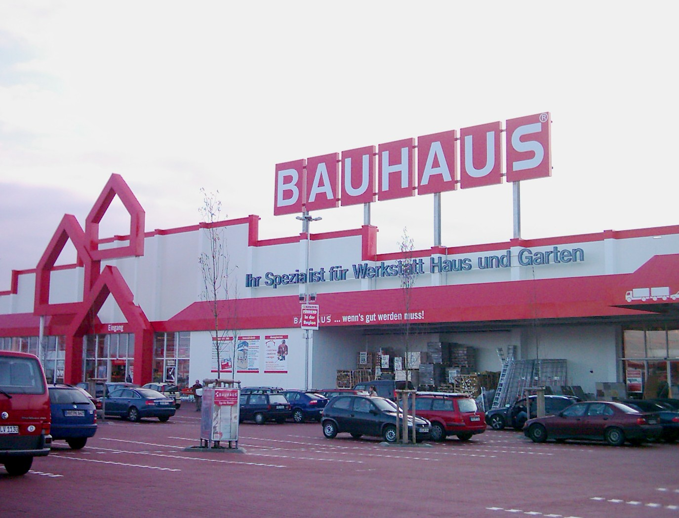 Der Bauhaus Markt in Barsbüttel, Schleswig-Holstein.